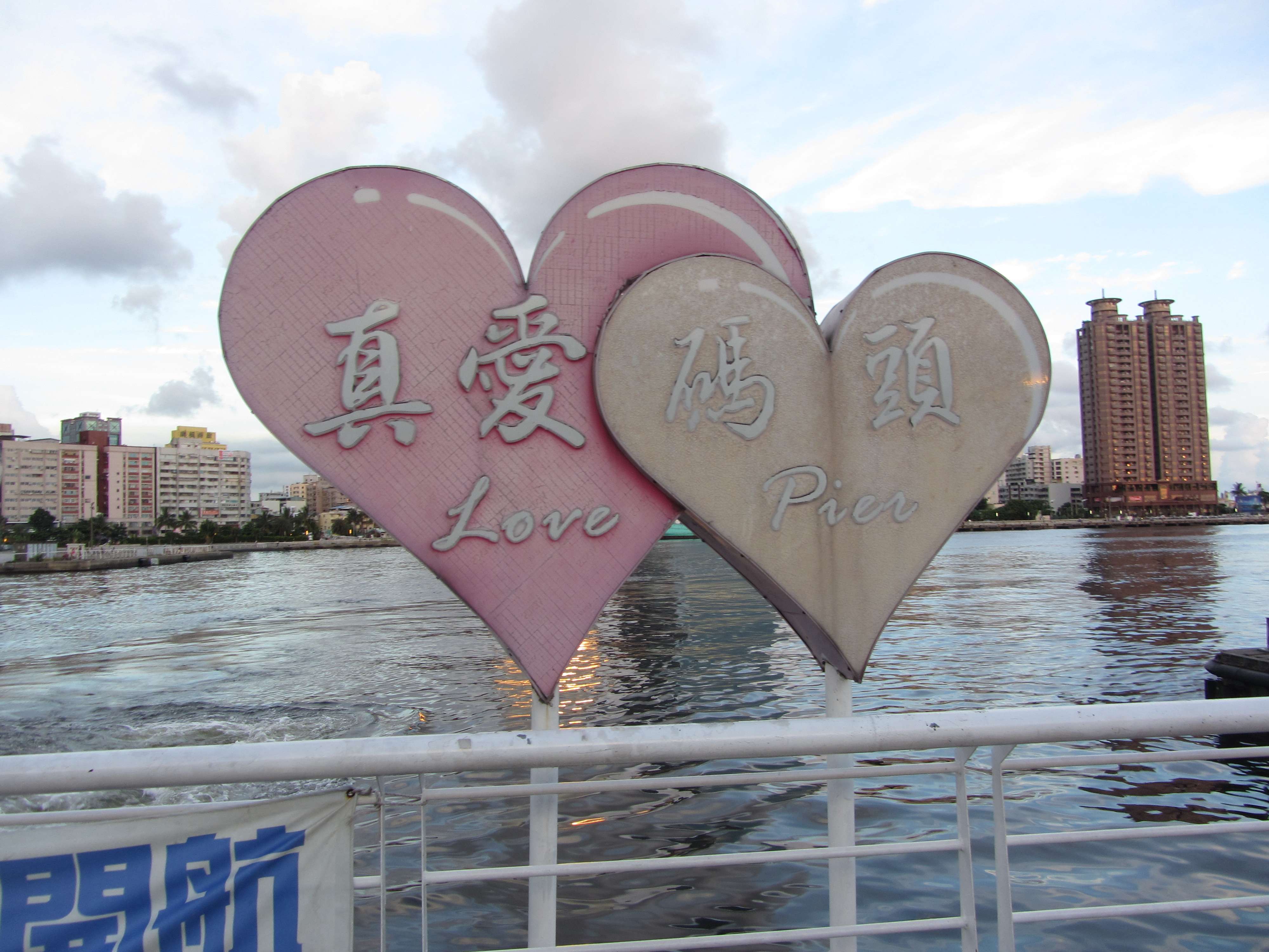 高雄港真愛碼頭